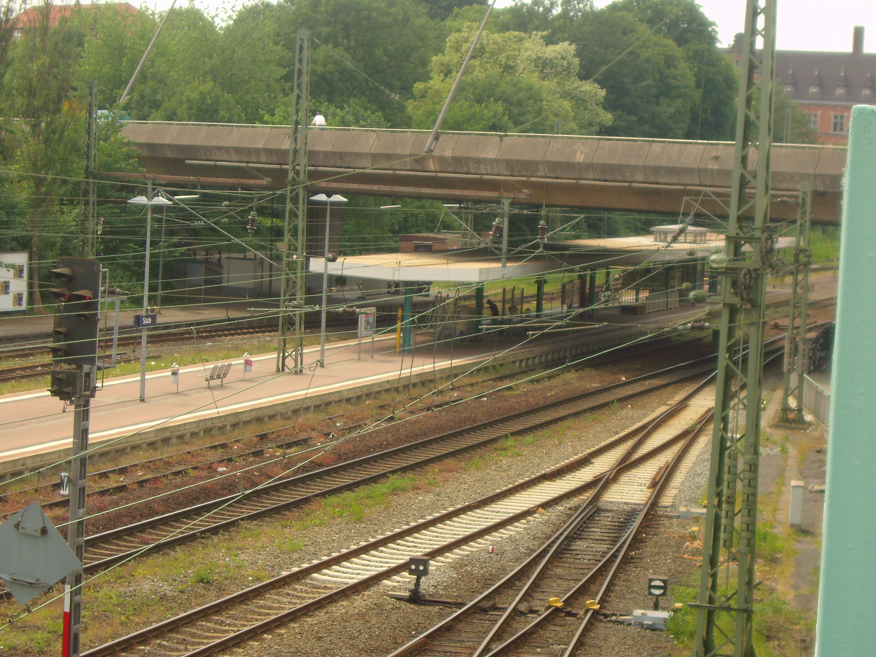 Bahnhof Stade mit Hansebrücke, Niedersachsen, Deutschland. Autor: jarod63